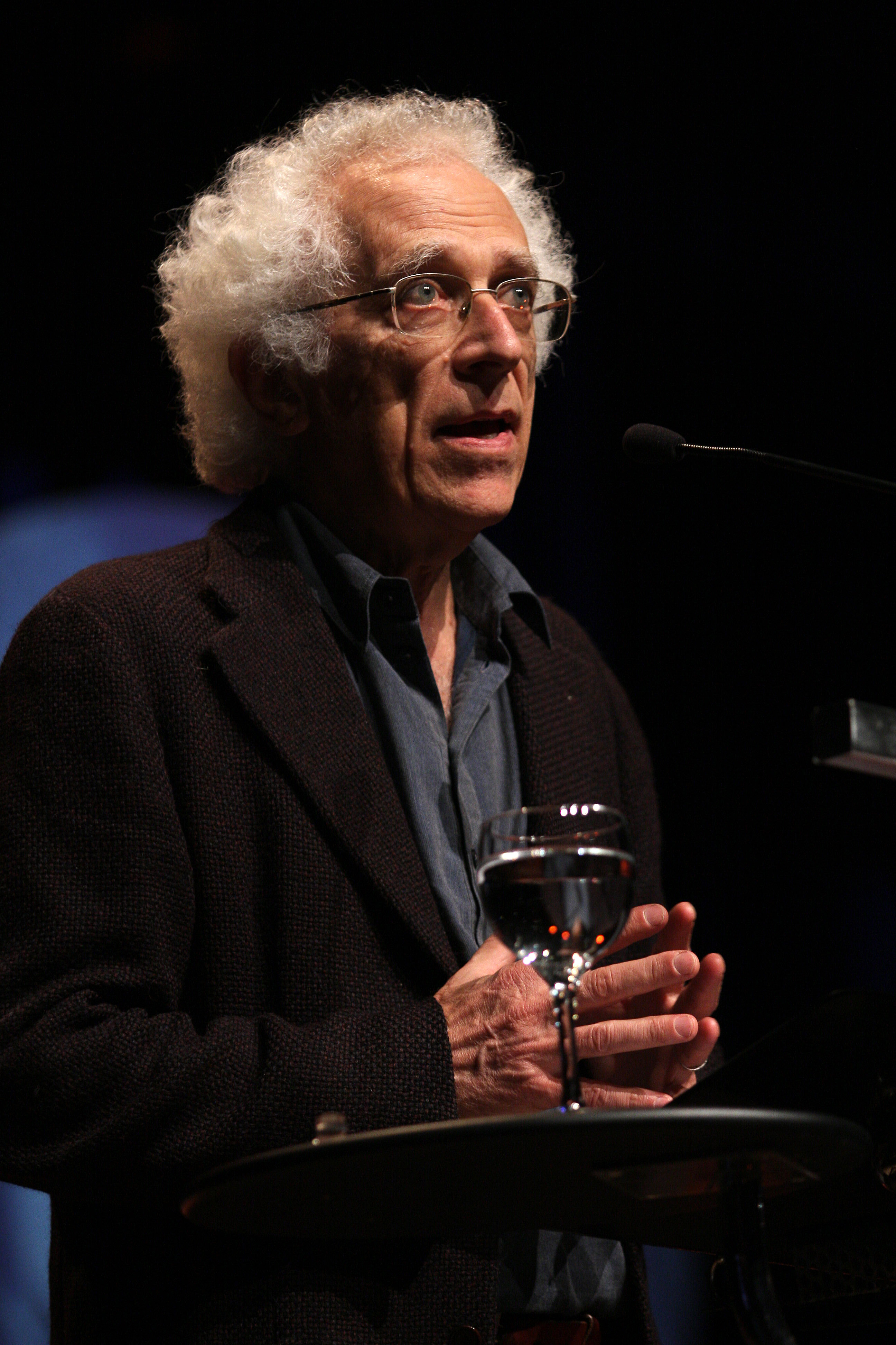 Tzvetan Todorov no Fronteiras do Pensamento Porto Alegre 2012